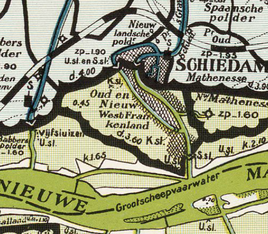 Oud_en_Nieuw_West_Frankenland